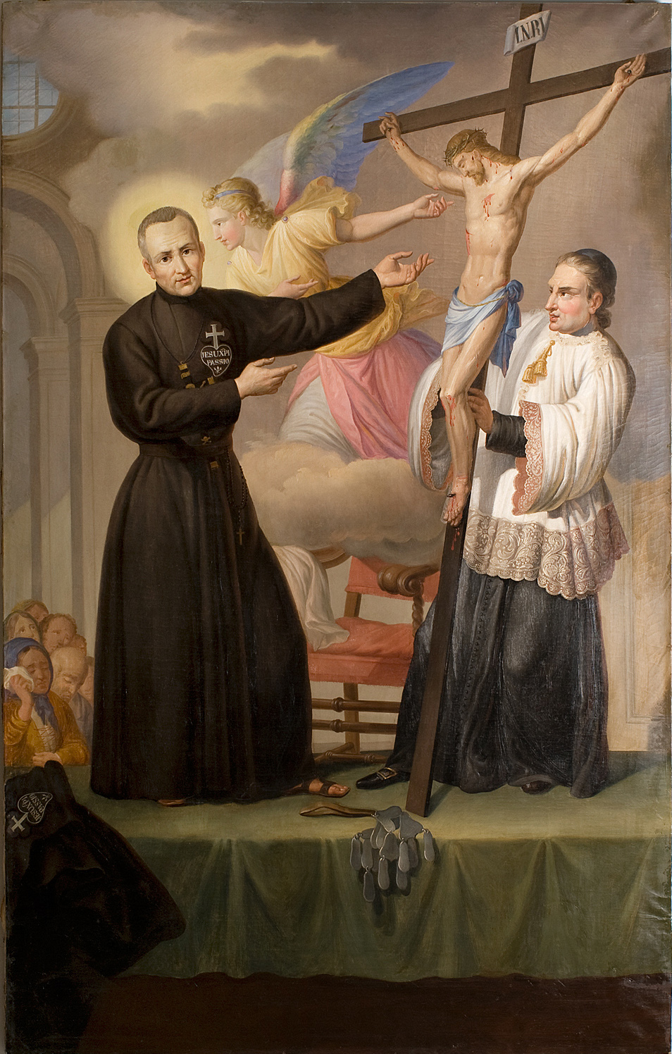 Dos Hermanos Predicando